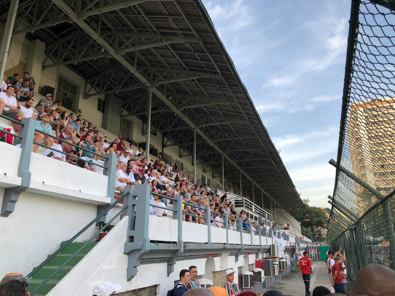 Torcida Tricolor na Tribuna do Estádio de Laranjeiras em jogo festivo para comemorar o aniversário de 114 anos do Fluminense Football Club.